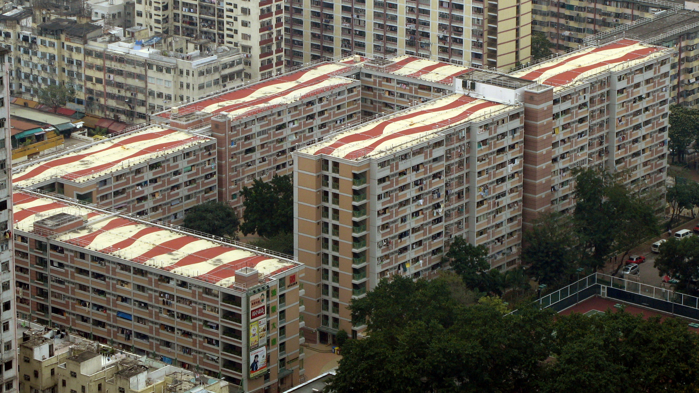 HK Moon Lok Dai Ha